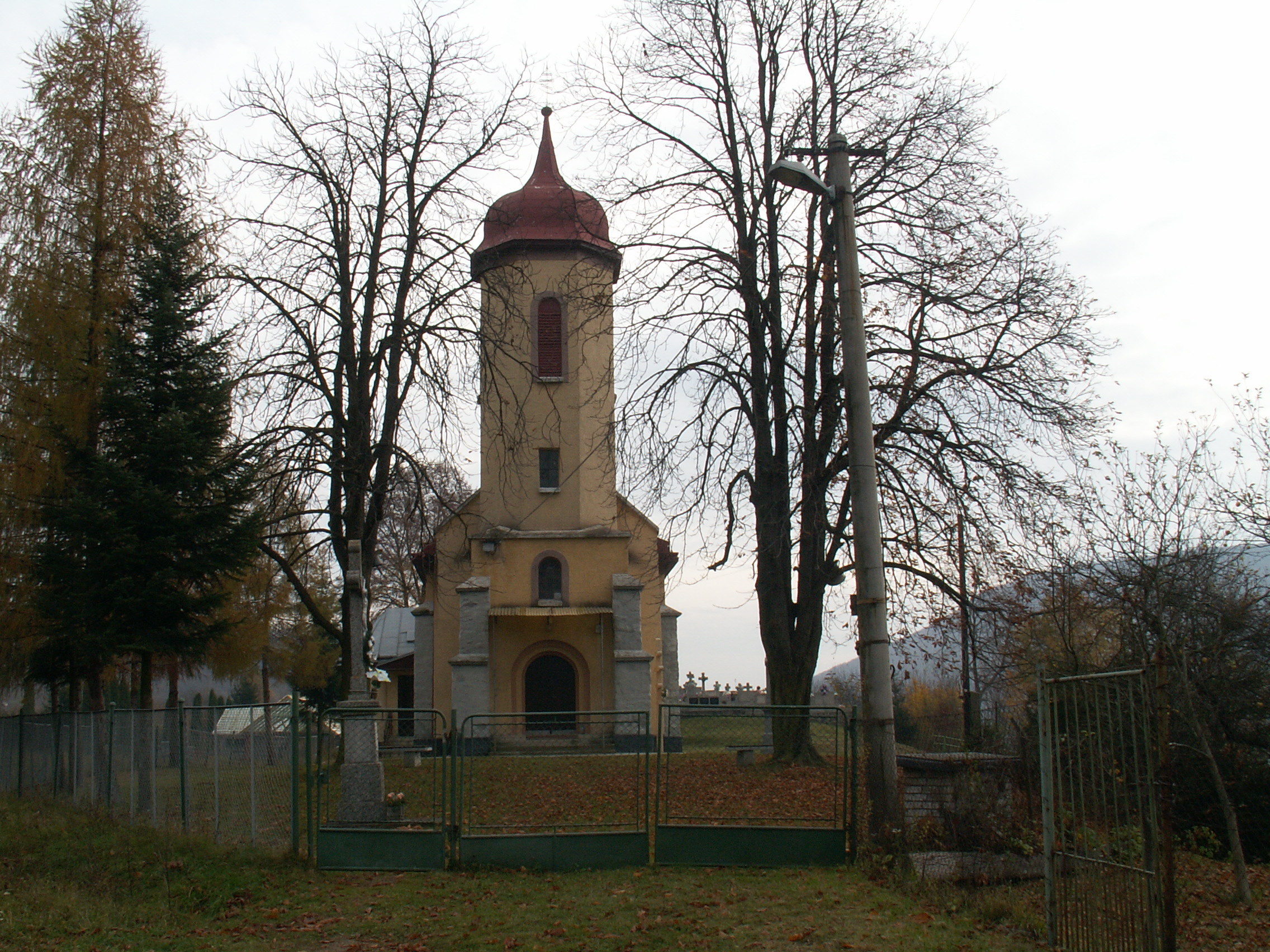 Obrázok Juskovej Voli